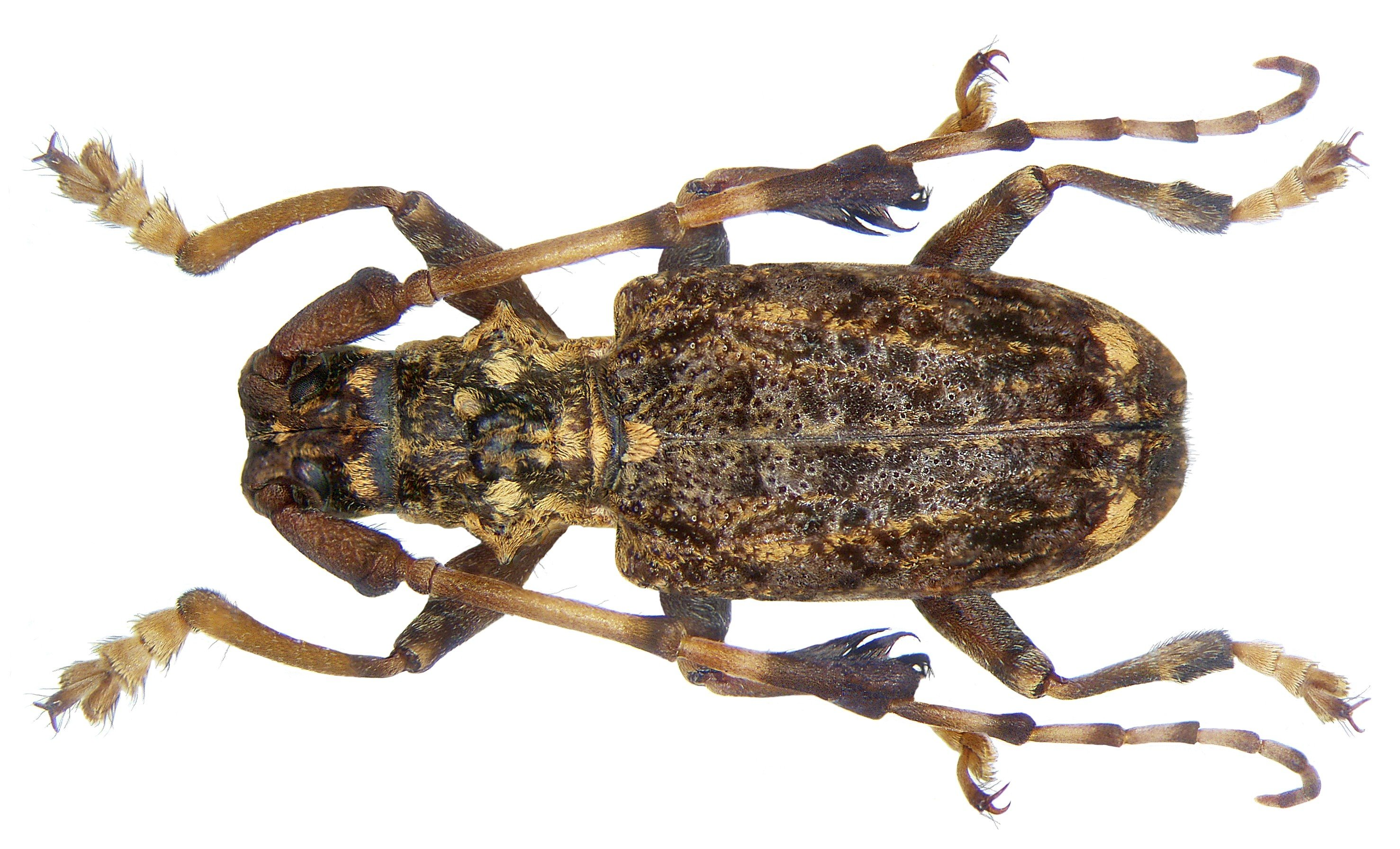 Familie: Cerambycidae Groesse: 13,5 mm Fundort: Nepal, Birethanti leg. A.Skale, 2000; det. A.Weigel Foto: U.Schmidt, 2007